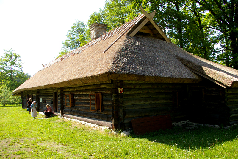 Eesti Vabaõhumuuseum